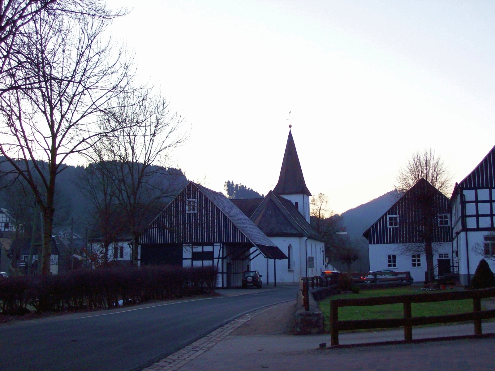 St. Blasius Kirche in Westfeld (Schmallenberg), Germany.